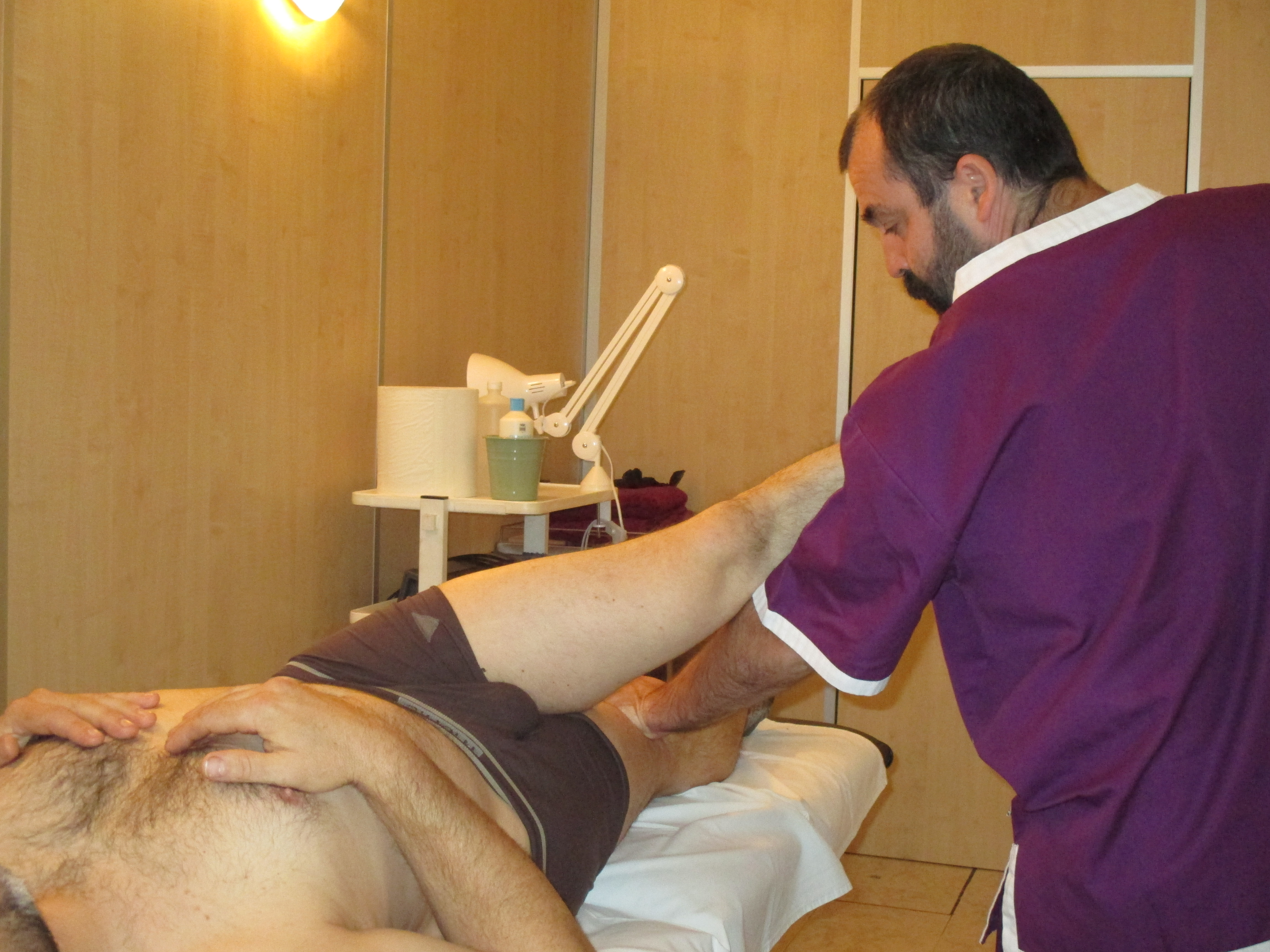 Fisioterapeuta bat mokorreko muskulu abduktoreen luzaketa eginez.